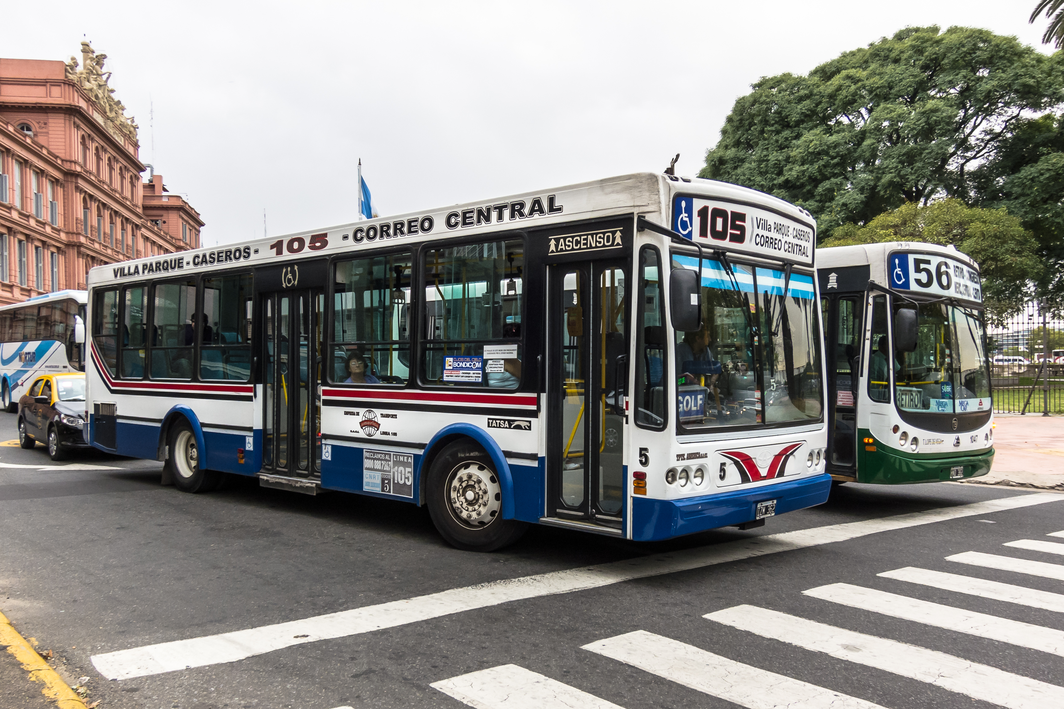 Colectivo de la Línea 105, interno 5, carrocería y chasis TATSA Puma D10.5, matrícula IZM362. Buenos Aires, Argentina.